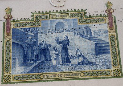 Instalações da ex-Açucareira do Caxito 5